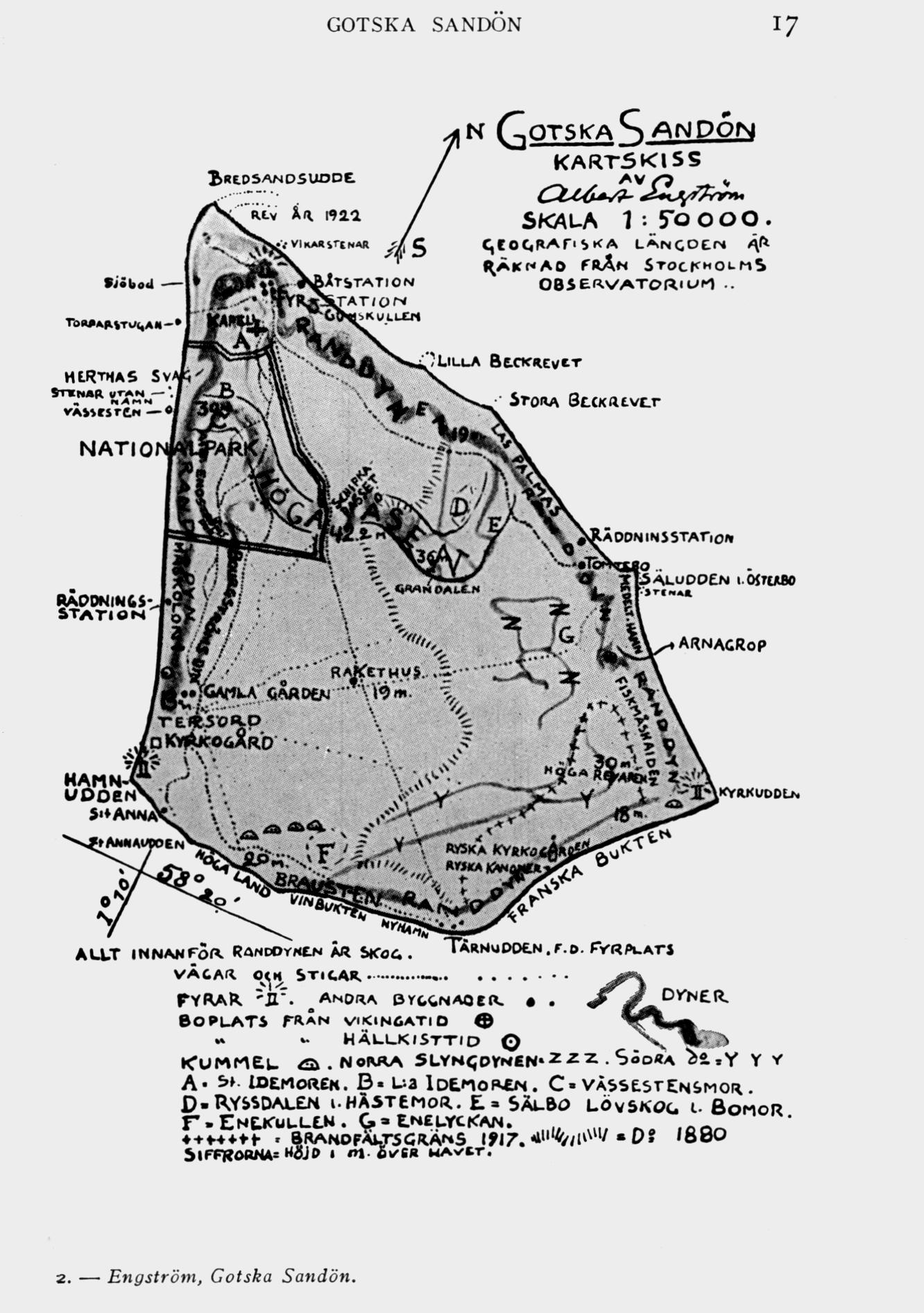 Fran boken om Gotska Sandön